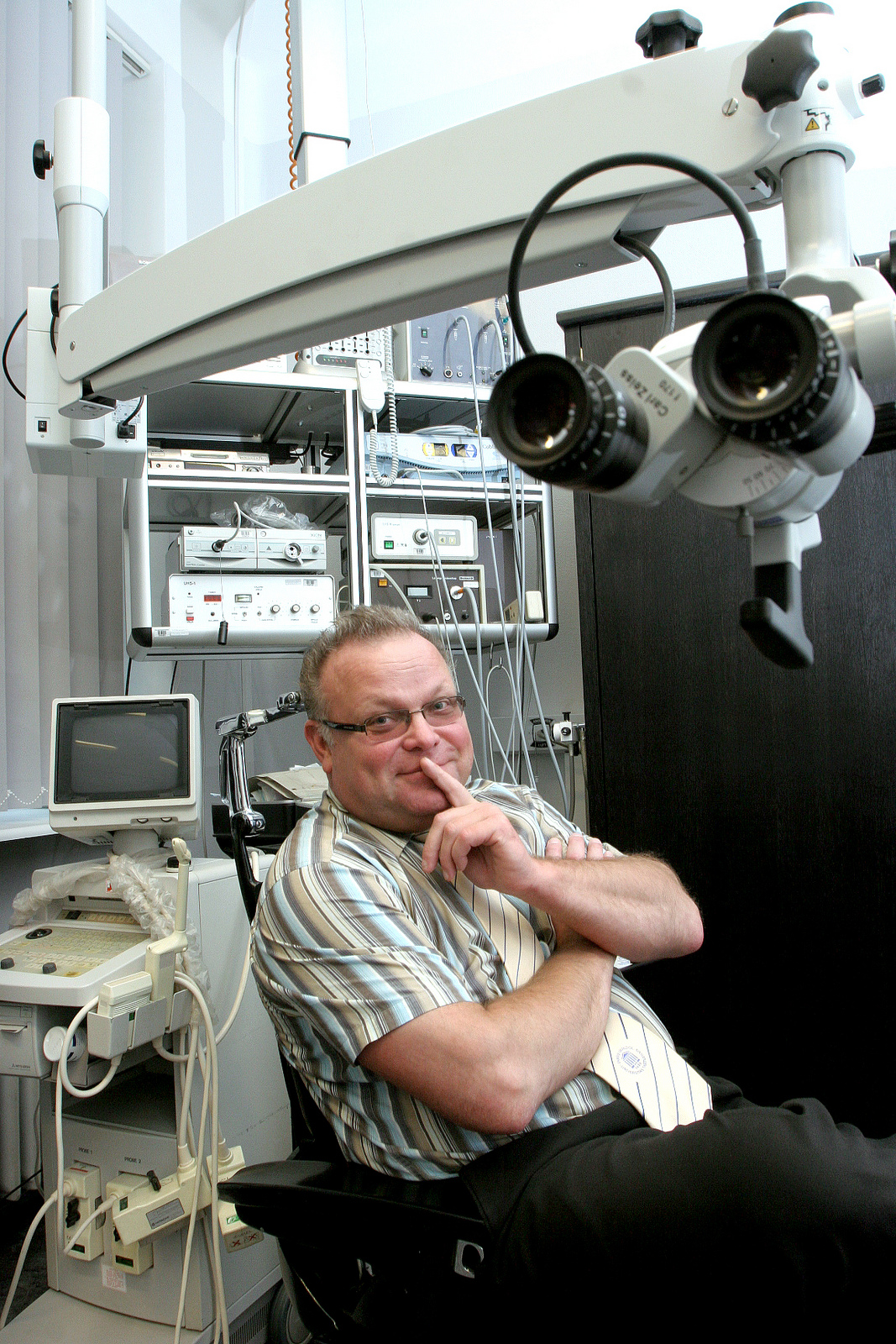 Kõrva-nina-kurguarst Mart Kull 3. oktoobril 2007 oma kabinetis Tartus, Kuperjanovi tänaval.